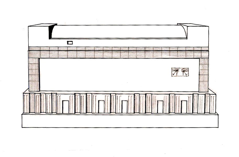 Sarcophage d'Amenemhat III à Dahchour